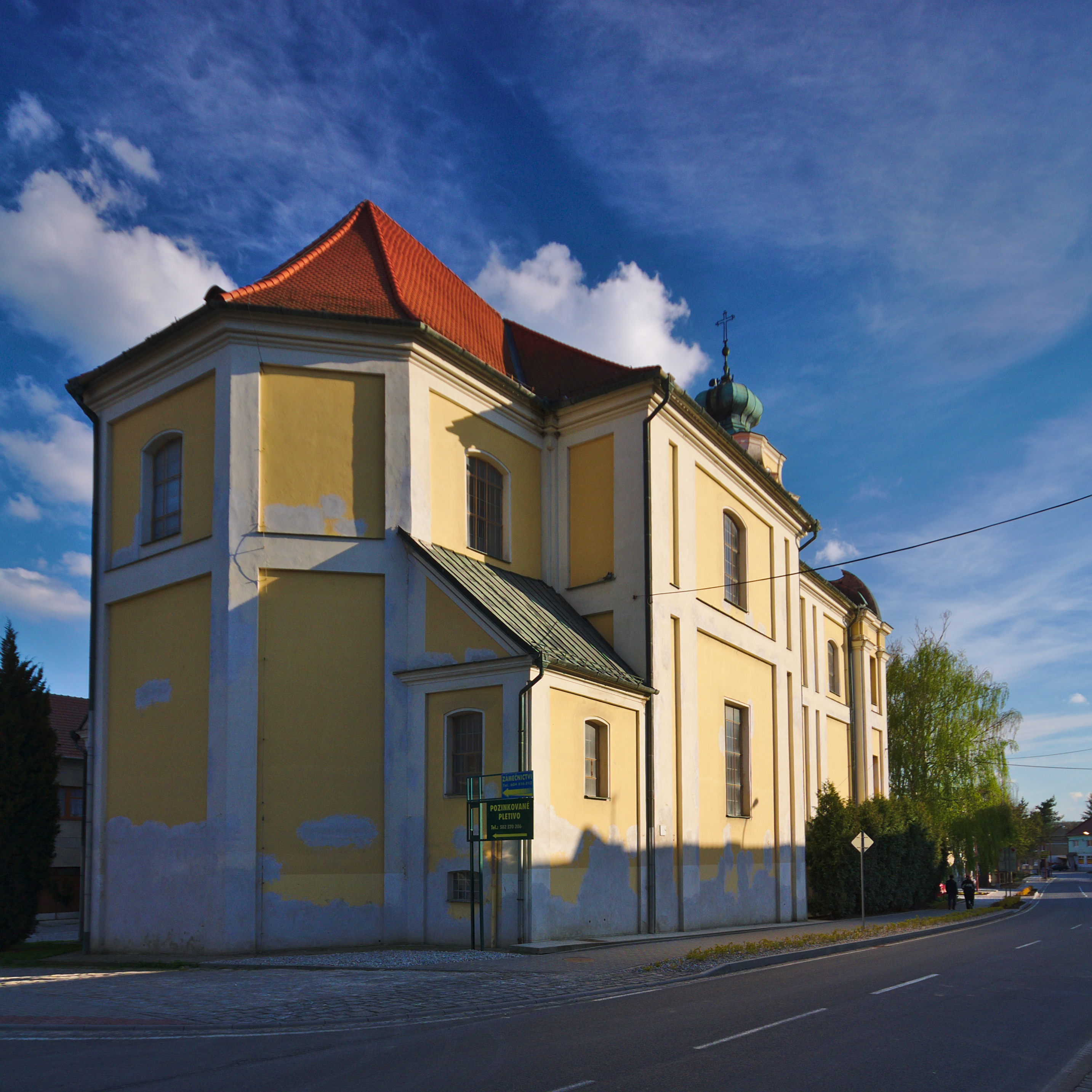 Kostel Povýšení svatého Kříže, Brodek u Prostějova, okres Prostějov